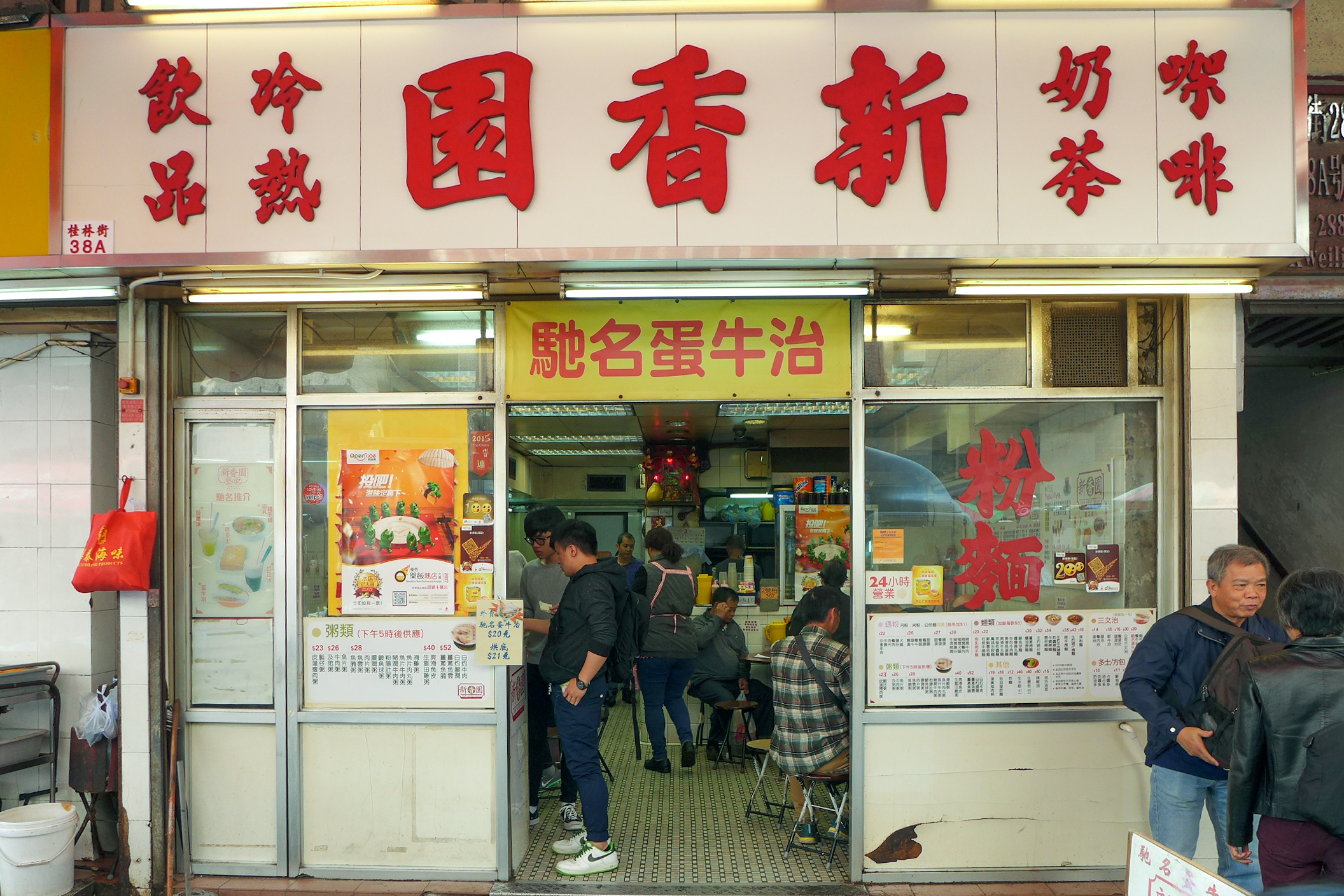 新香園 (堅記)